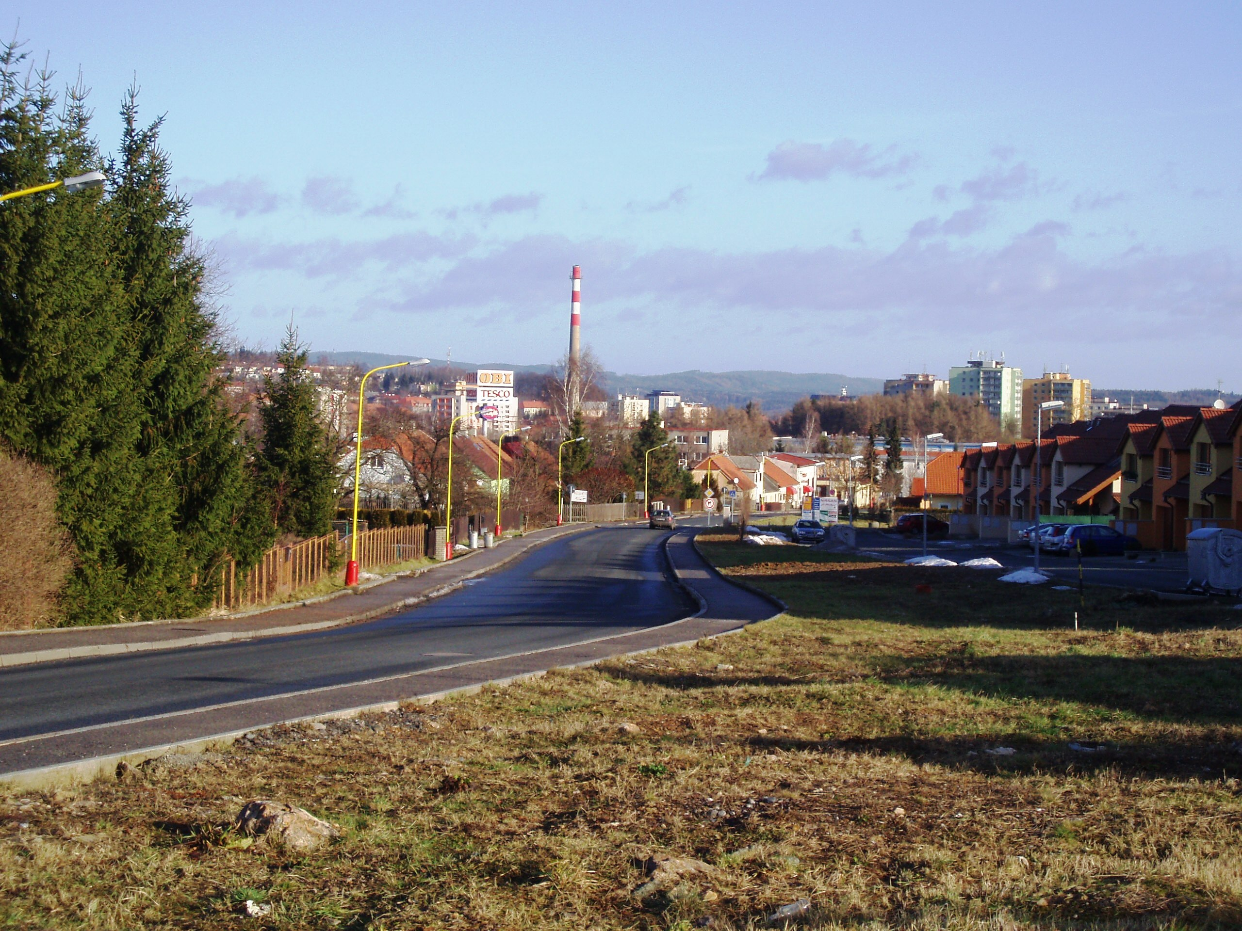 Zdaboř - celkový pohled